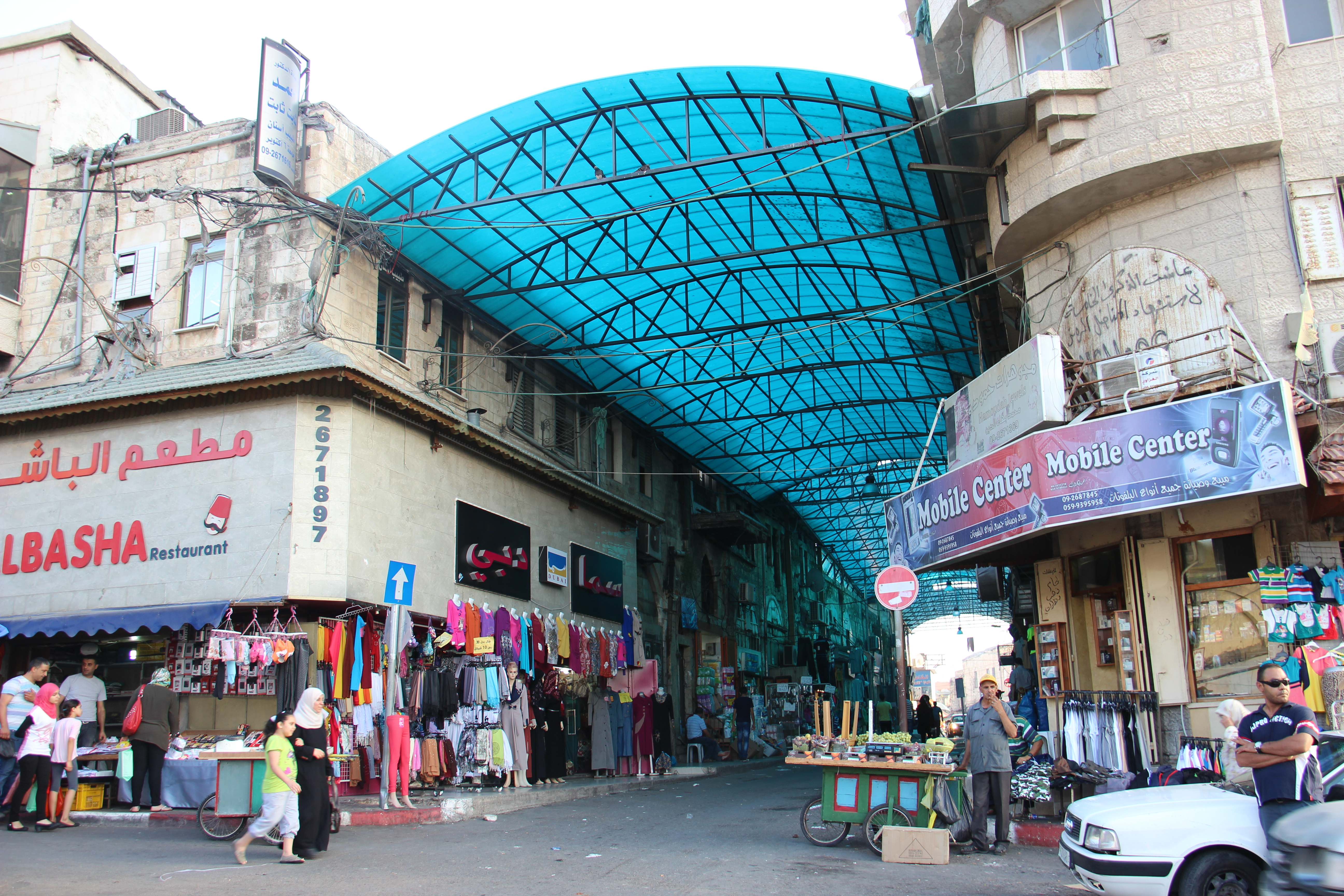 سوق في طولكرم